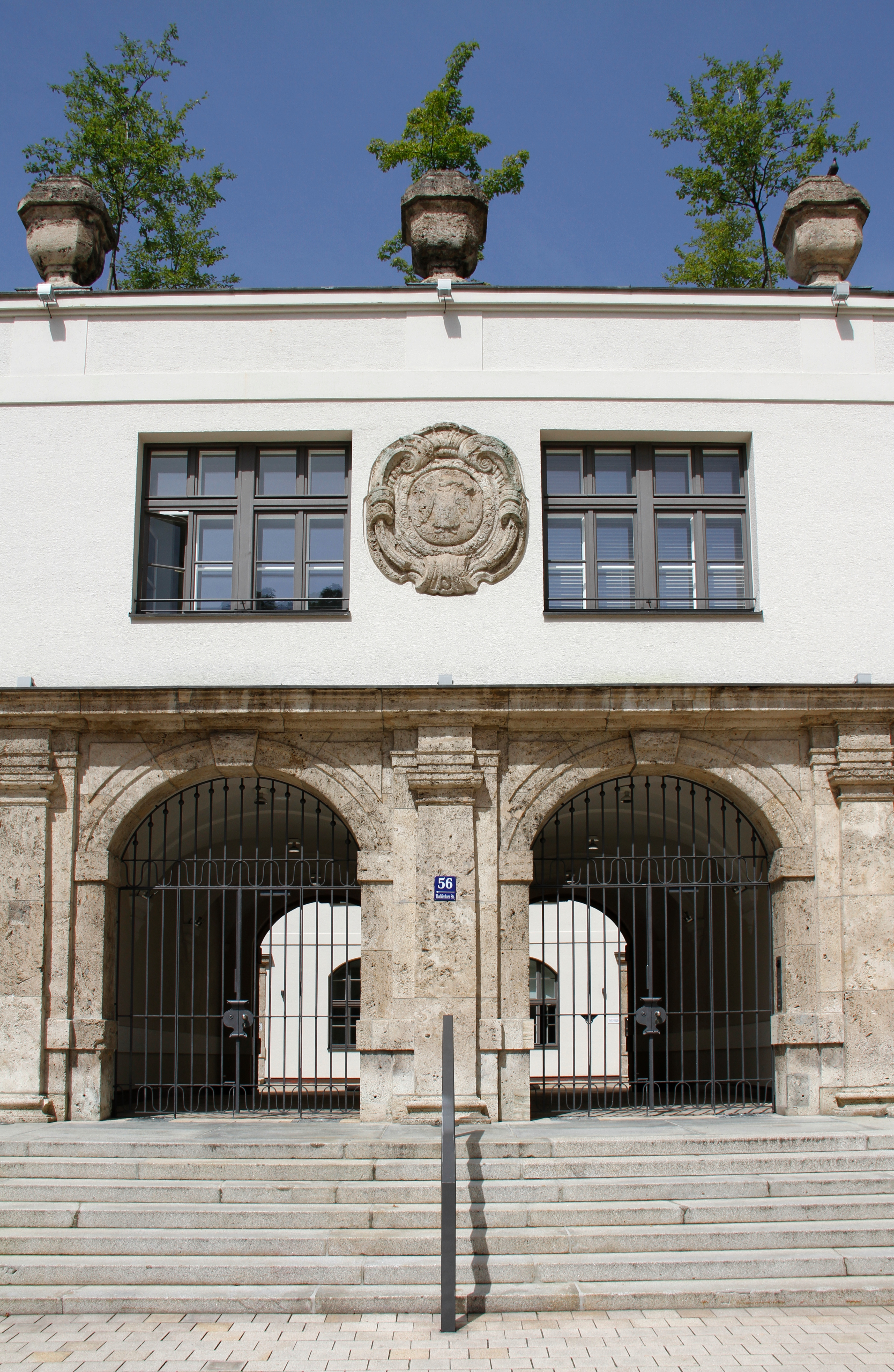 Thalkirchner Straße 54-60, München. Ehemaliges städtisches Arbeitsamt, errichtet 1912/13 von Hans Grässel. Umgebaut als Wohngebäude durch Phillip Starck. Haupteingang mit Münchner Stadtwappen in Kartusche über dem Tor